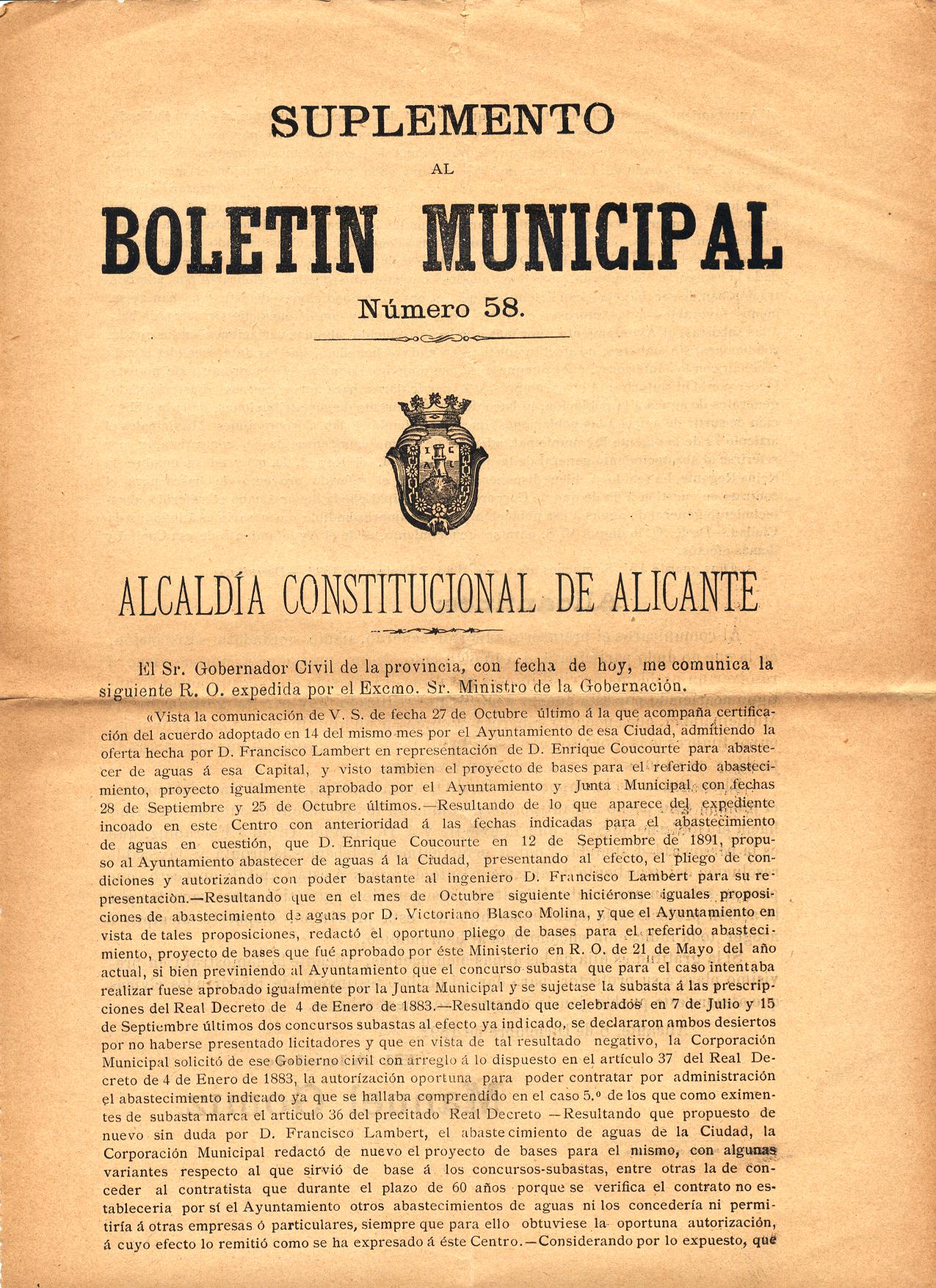 Alicante 1892. Boletín Municipal explicando el alcalde Manuel Gomiz el cambio Suministro Agua y agradeciendo la labor del diputado Anton Ferrandiz. PAGINA 1